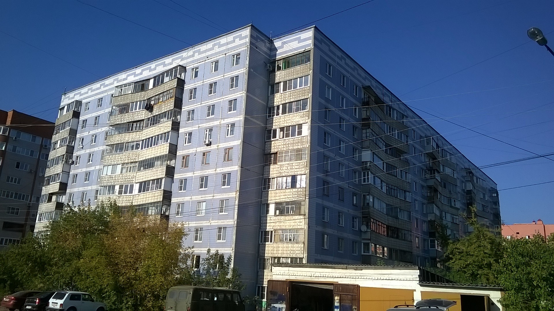 Рязань, дом серии 121. Адрес: 4-я линия, 34.